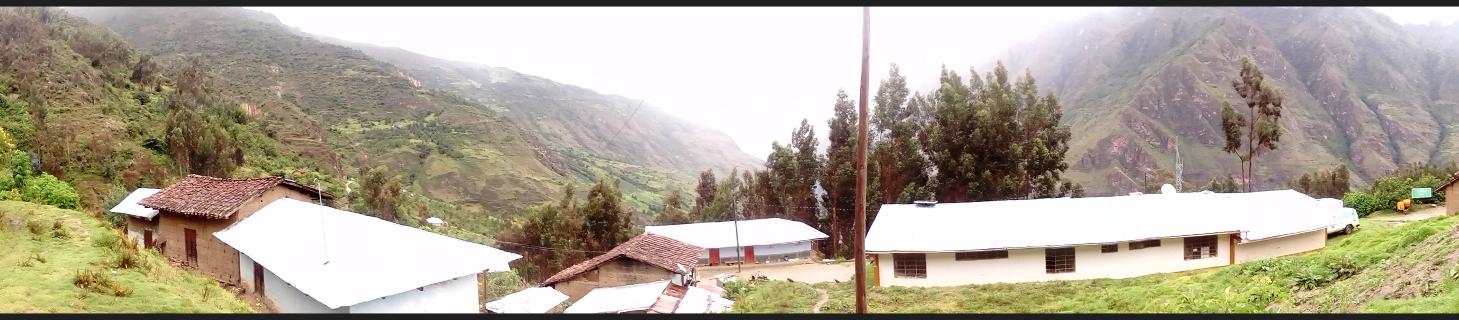 Vista panorámica de una calle del distrito de Jircán, a la derecha el hospital del distrito.